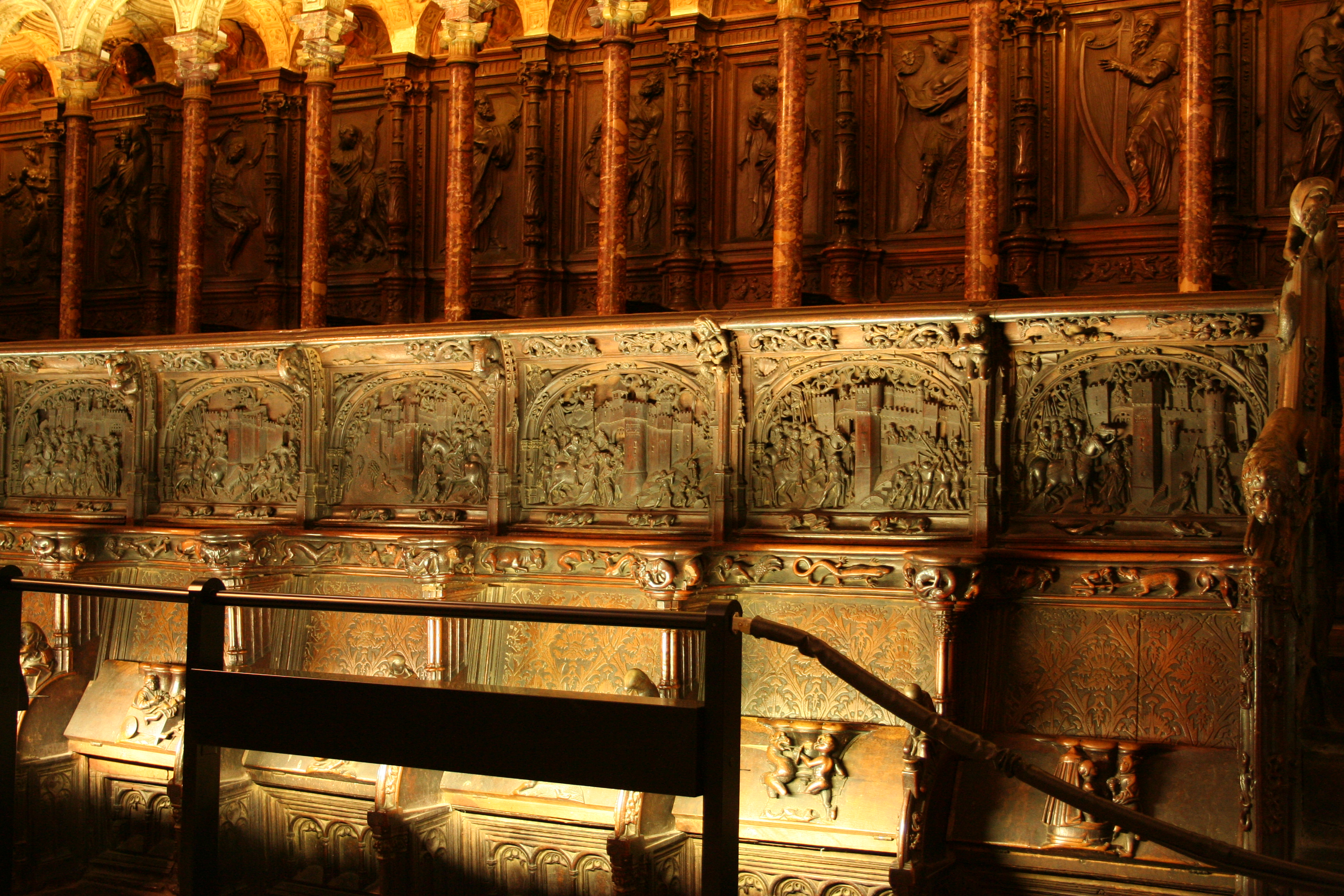 Silleria del coro de la catedral de Toledo con bajorelieves dedicados a las batallas ganadas por los Reyes Católicos en la reconquista.